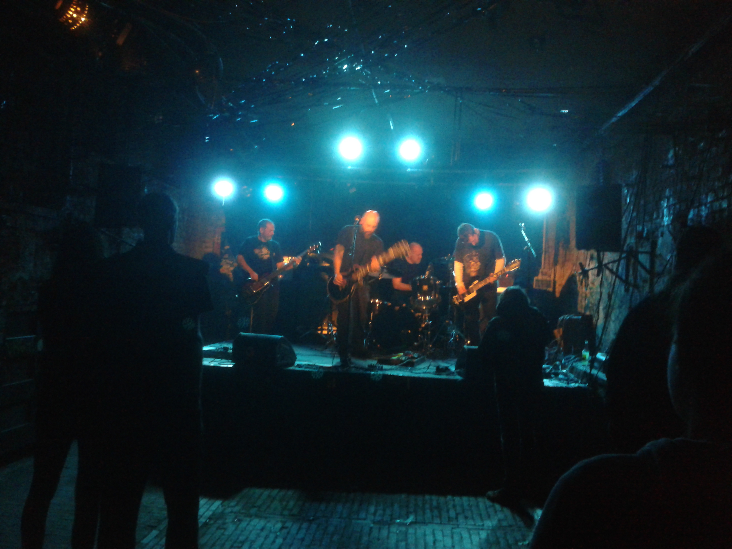 Die französische Post- und Doom-Metal-Band Dirge im Autonomen Zentrum in Mülheim an der Ruhr am 01. November 2015 um 22:35 Uhr.